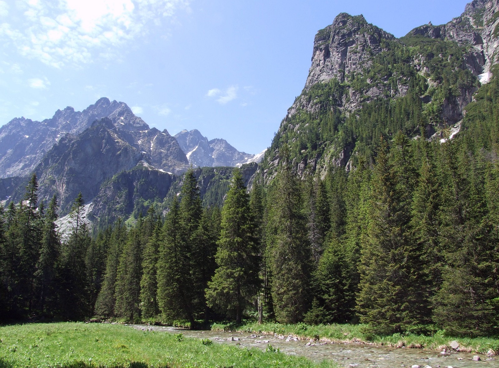 Dolina Białej Wody poniżej progu Doliny Ciężkiej. Po prawej stronie tego progu Niżnia Młynarzowa Kopa, po lewj stronie Gankowa Strażnica, nad nią Kacza Turnia